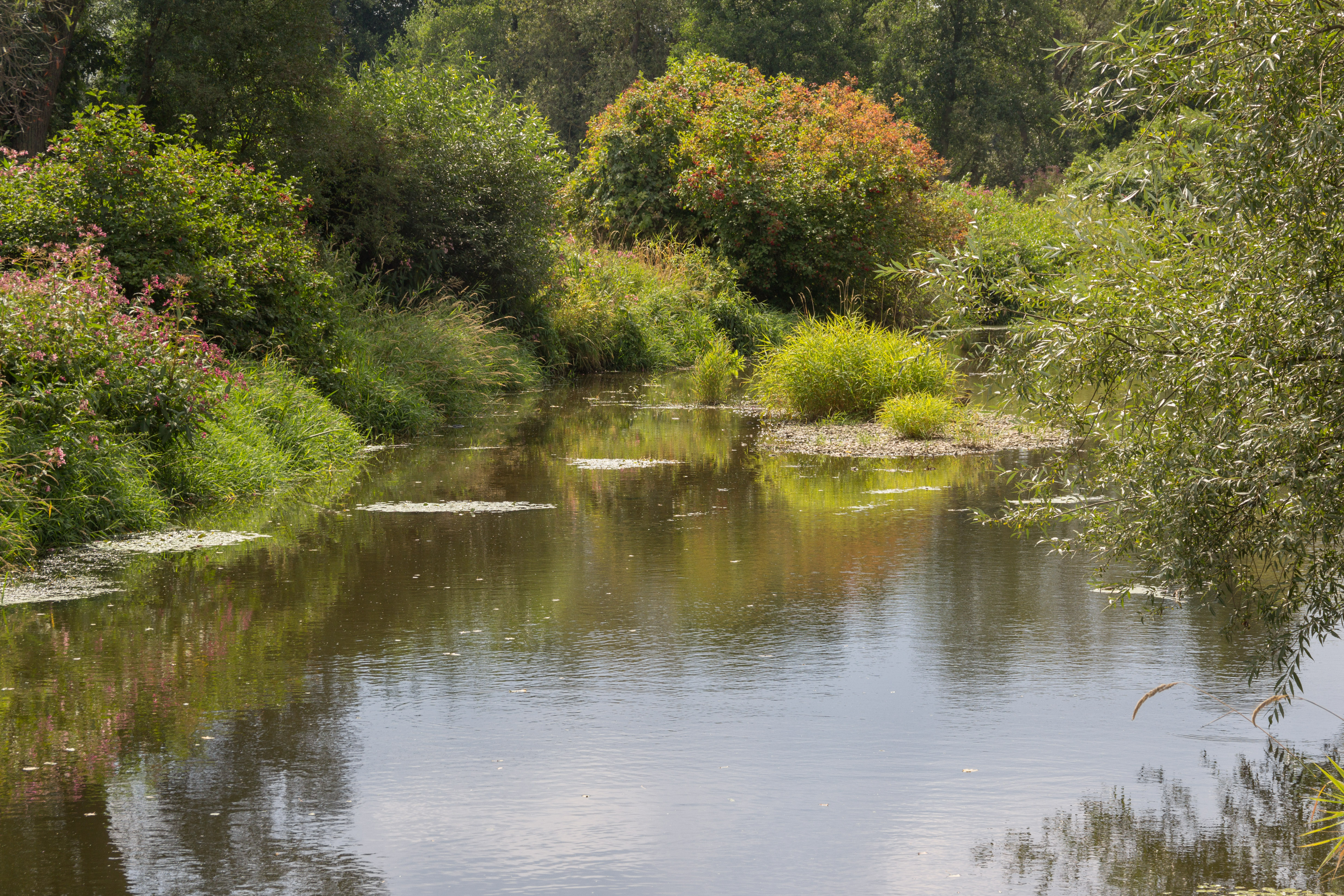 Naab, Schwandorf, FFH-Gebiet „Naab unterhalb Schwarzenfeld und Donau von Poikam bis Regensburg“